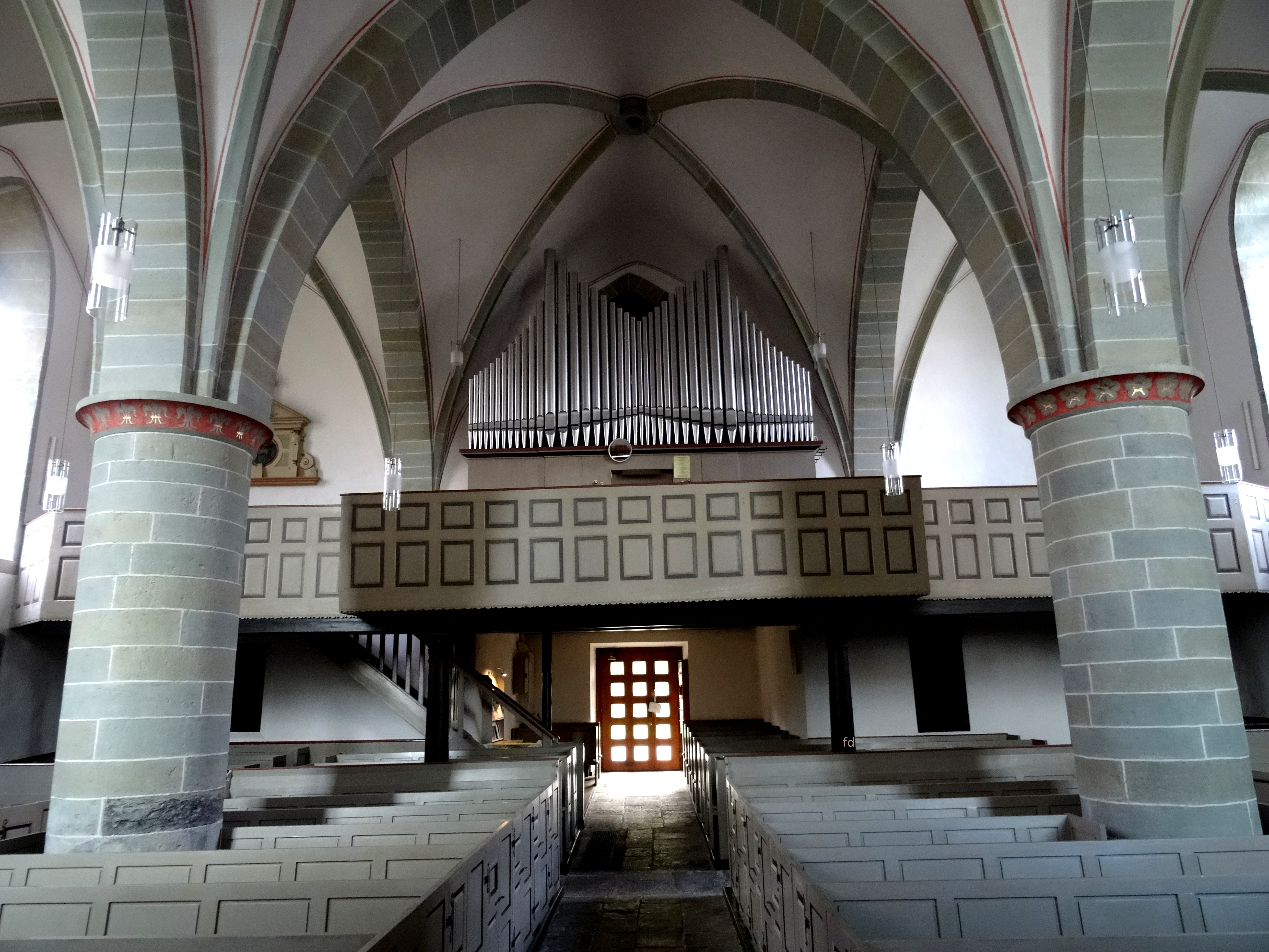 Ev.Kirche Bad Sassendorf Orgel.